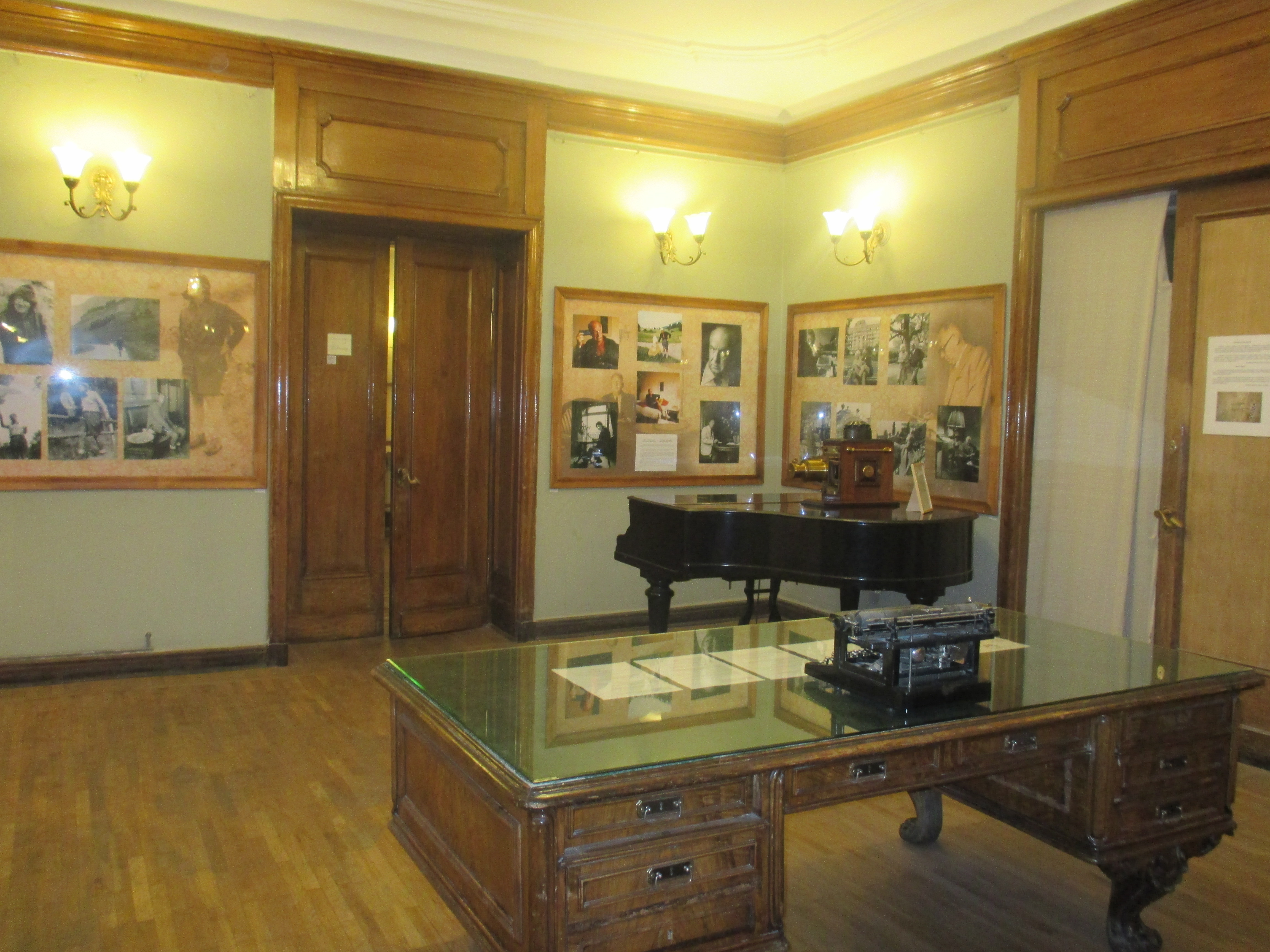 Une des salles du musée Nabokov à Saint-Pétersbourg, 47 rue Bolchaïa Morskaïa.